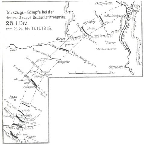 Karte: Rückzugskämpfe der 26. I.D. 1918